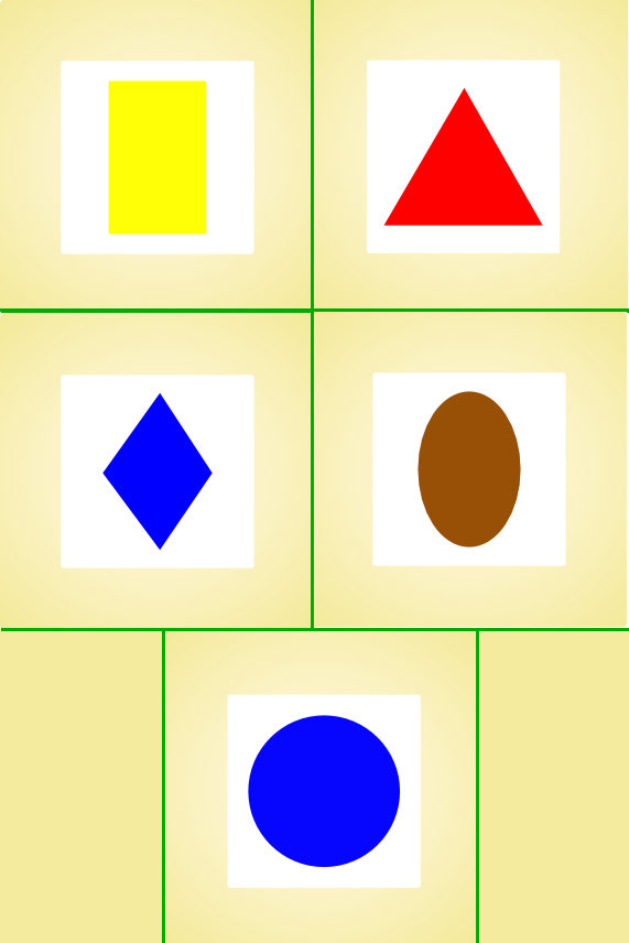 Oznakowanie samochodów Polskich Sił Zbrojnych na Zachodzie - wojsko Polskie we Francji Na samochodach znaki malowano na błotnikach i drzwiach kabiny kierowców. piechota - żółty prostokąt artyleria - czerwony trójkąt rozpoznanie - niebieski romb saperzy - brązowa elipsa kompanie samochodowe - niebieskie koło